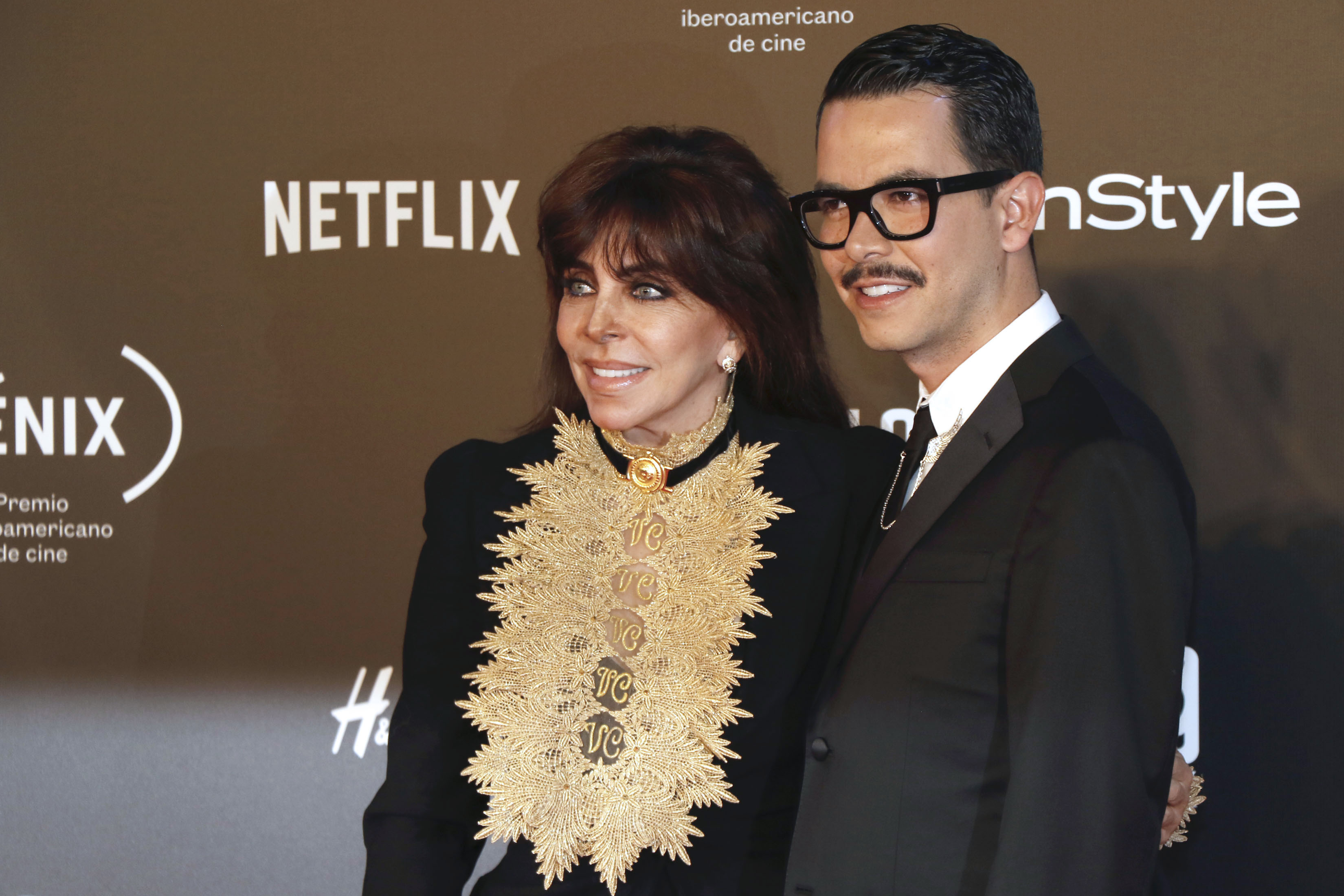 Miércoles 6 de diciembre de 2017En el Teatro de la Ciudad Esperanza Iris, se realizó la 4ª Entrega del Premio Iberoamericano de Cine, Fenix, previo a la ceremonia, nominados, conductores, presentadores y elencos, desfilaron por la alfombra roja.Fotografía: Milton Martínez / Secretaría de Cultura CDMX